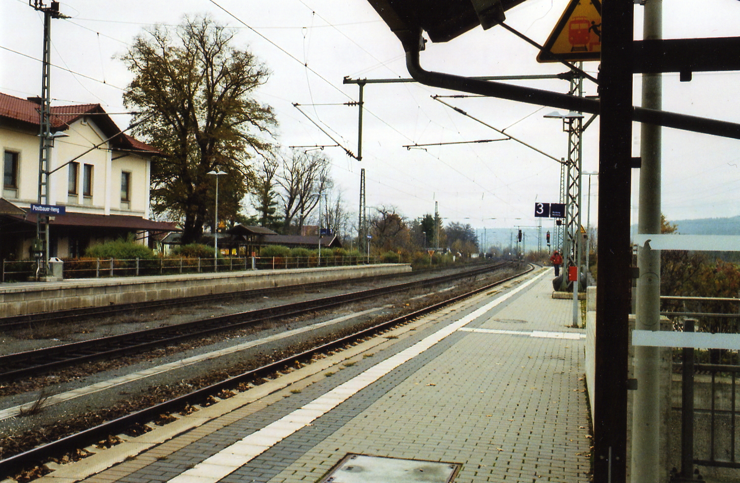 Bahnhof Postbauer-Heng von Bahnsteig 3 aus gesehen